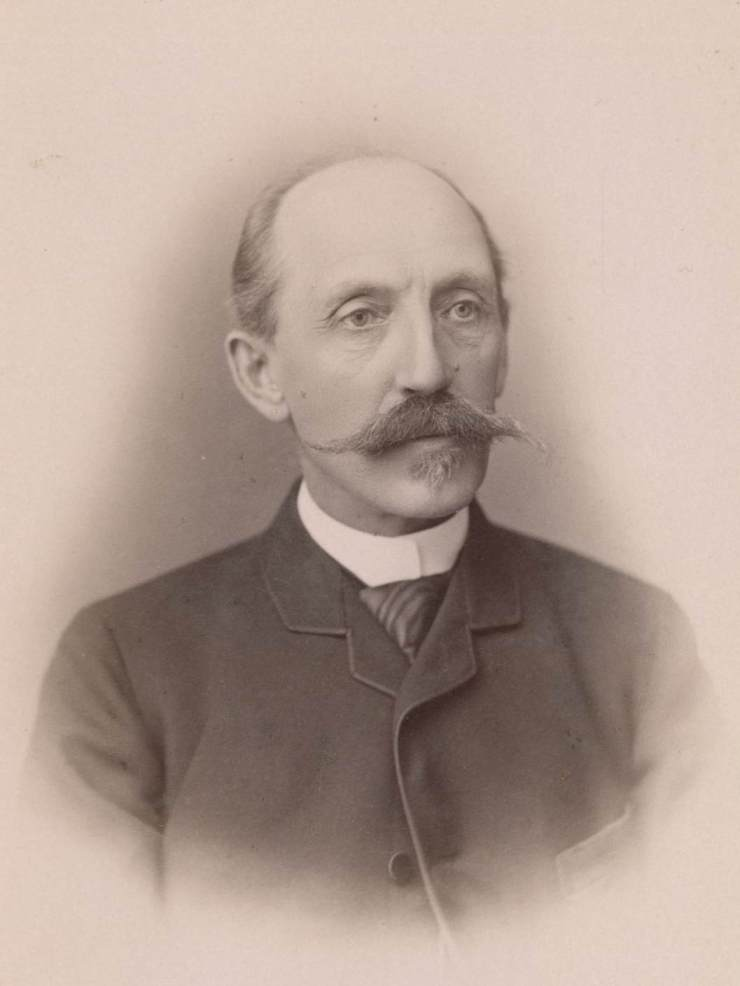 Eestimaa mõisnik ja poliitik Johann Georg Ernst von Grünewaldt (1830-1901)